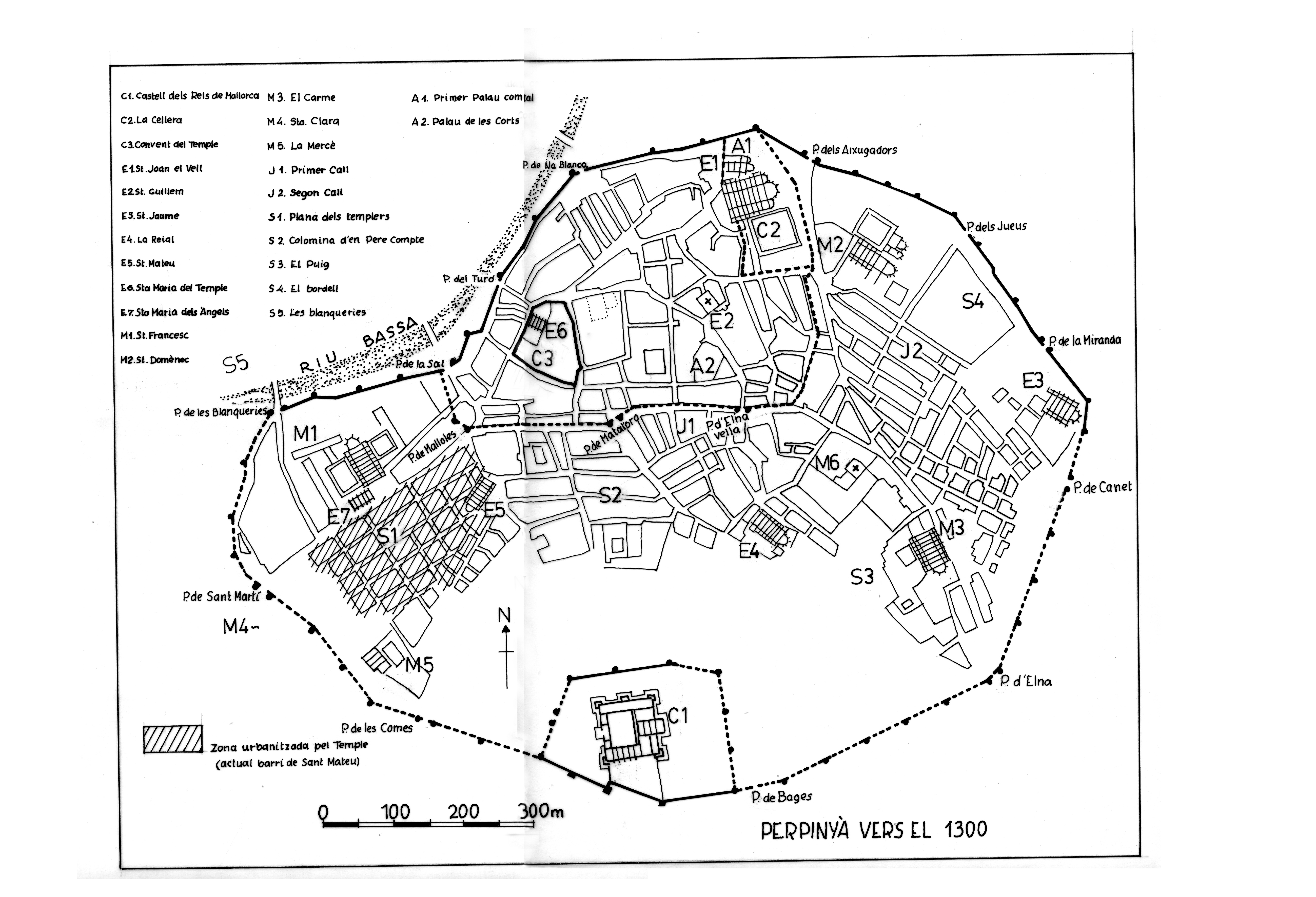 Planta de la ciutat de Perpinyà el segle XIII. (Fuguet, 1989, apèndix doc. núm 90)